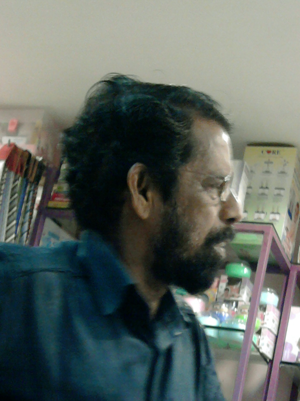 വേലായുധൻ കീഴില്ലം